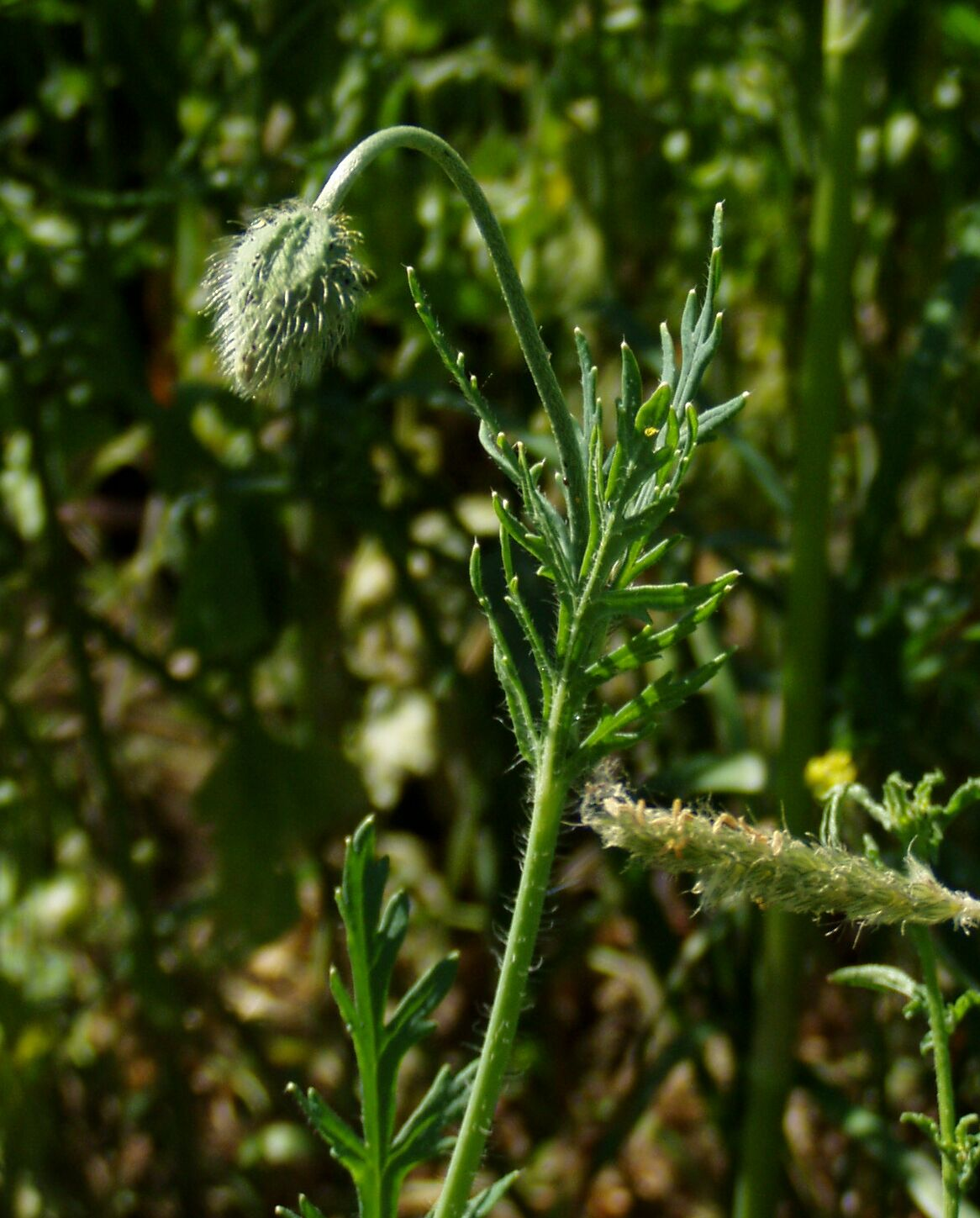 Papaver dubium in the Elbmarschen near Wedel, Hamburg, Germany